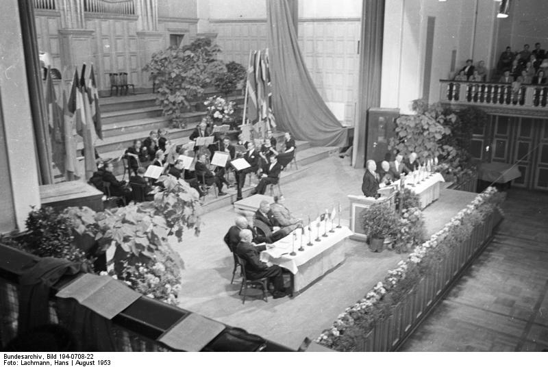 CVJM in Kassel